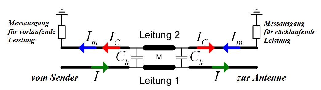 Kopplung Antenne Messgerät Interferenz Hochfrequenz Reflektierte Leistung